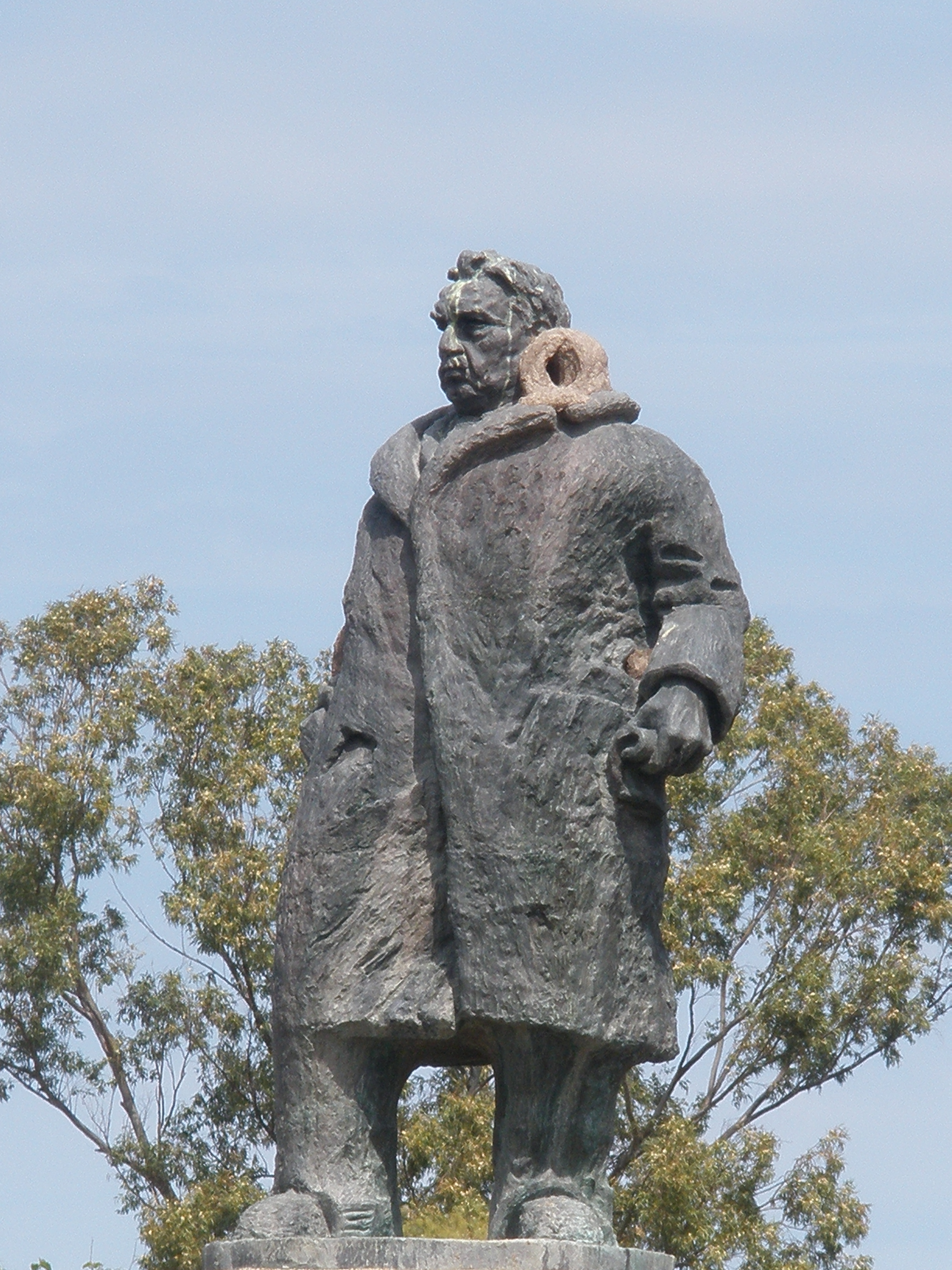 Estatua a don José Batlle y Ordóñez. Ubicada en el departamento de Paysandú